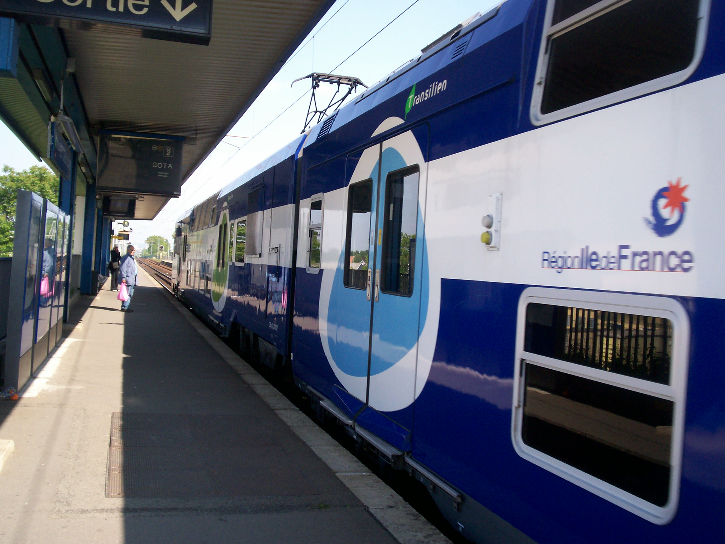 Gare des Grésillons